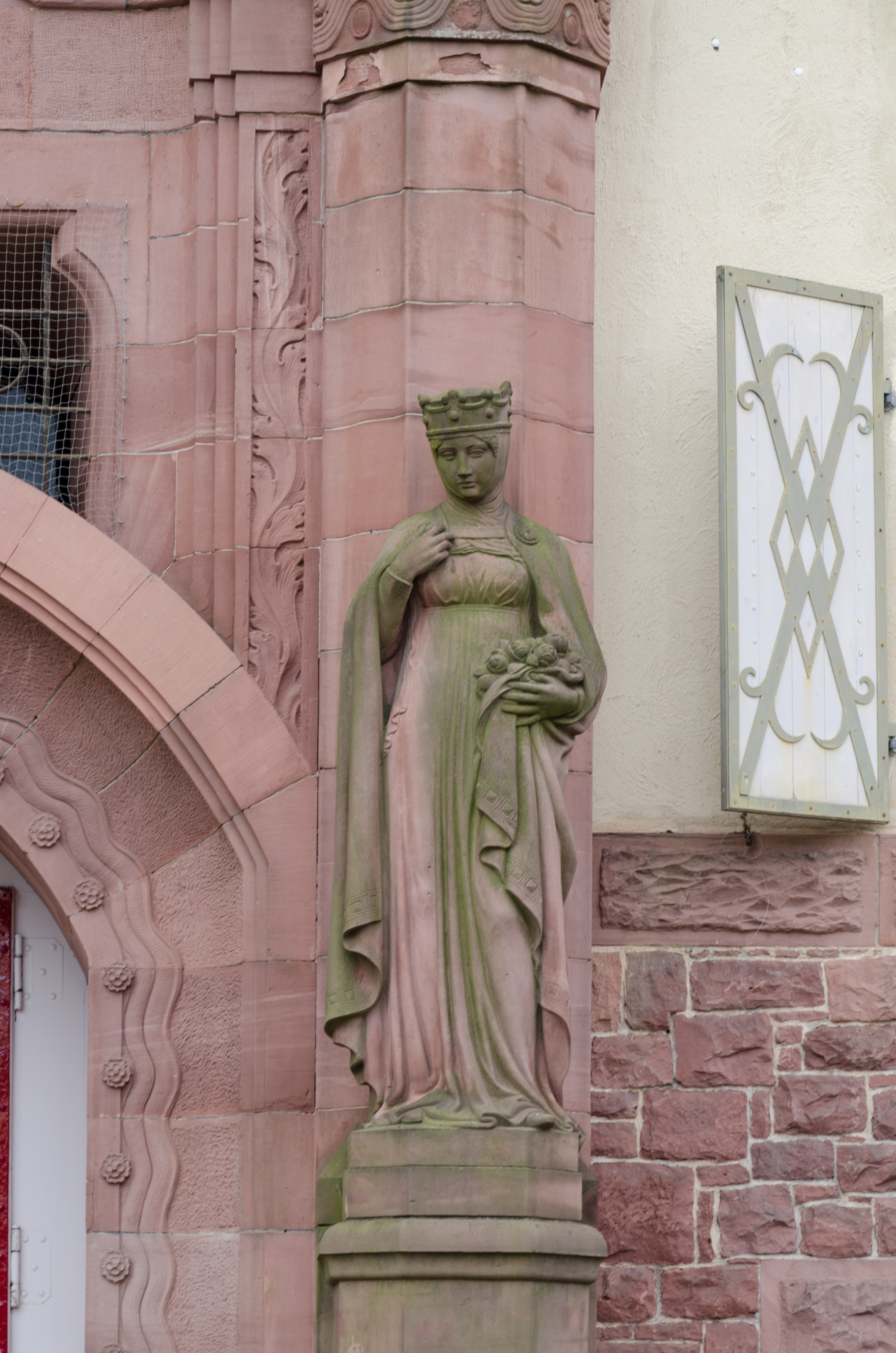 Aschaffenburg, Grünewaldstraße 18, Dalberg Gymnasium